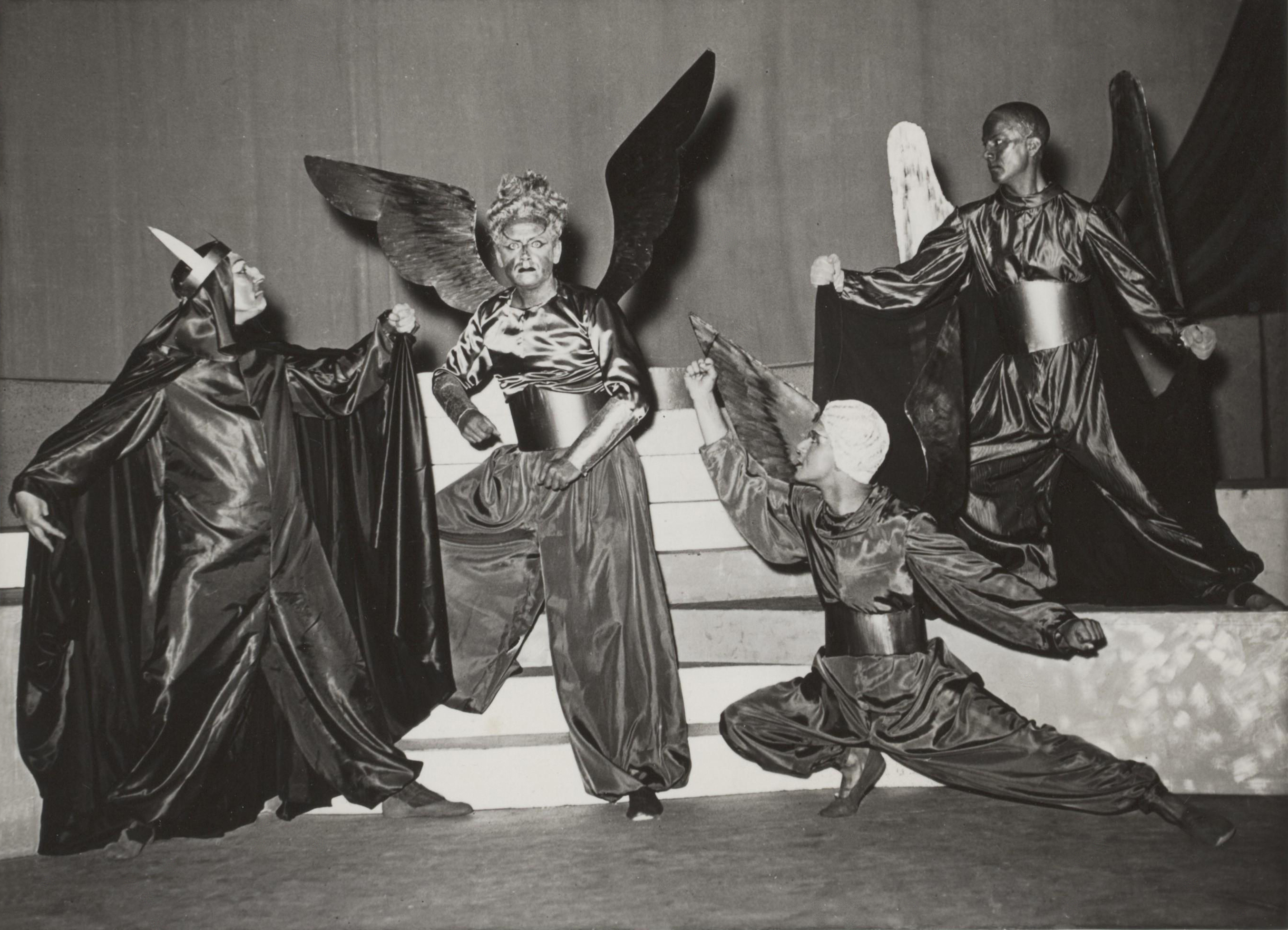 Zaterdagavond geeft het Residentie Tooneel te Den Haag een eerste opvoering van Vondel's "Lucifer". Scene uit het 1ste bedrijf, vlnr Richard Flink, Johan de Meester (Lucifer), Bob de Lange en Maarten Kapteyn Datum 19 juli 1940